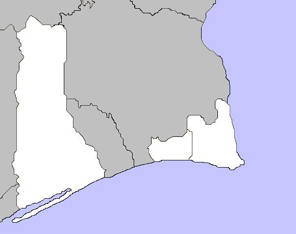 Freguesias do Município de Vila Real de Santo António